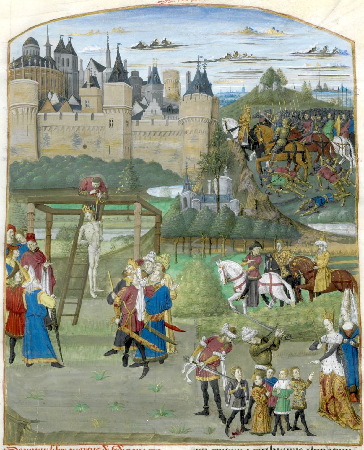 Mare Historiarum - BNF Lat4915 149r